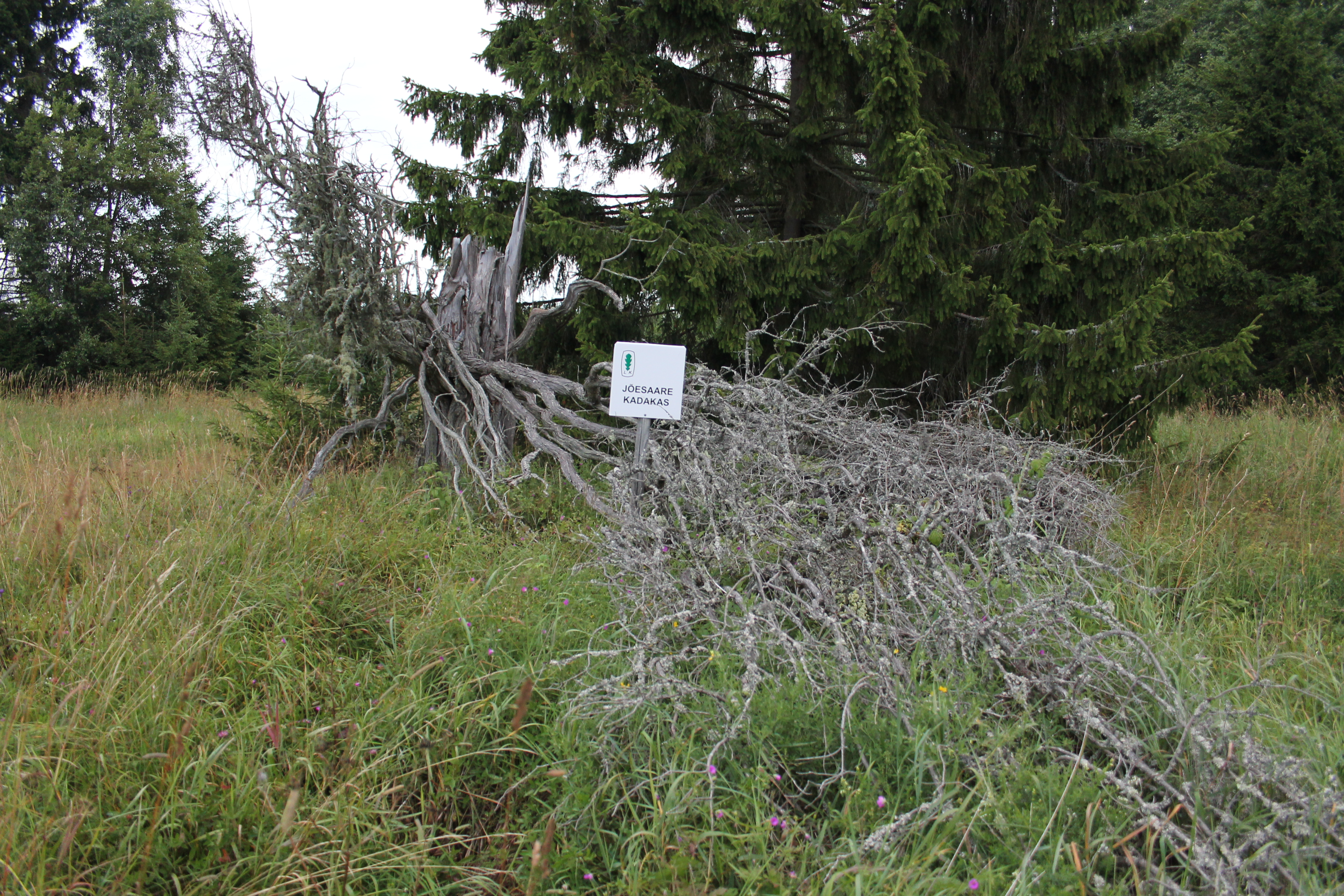 Jõesaare kadakas